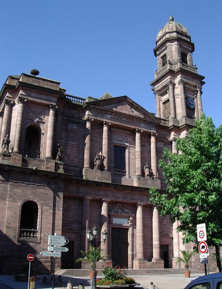 église Notre-Dame, Guebwiller, Haut-Rhin, Alsace, France